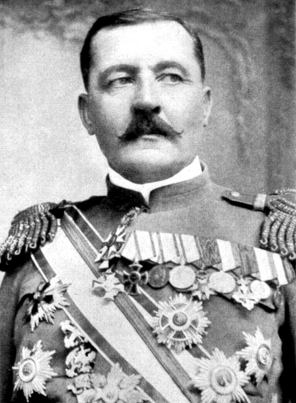 Brigadir Janko Vukotić